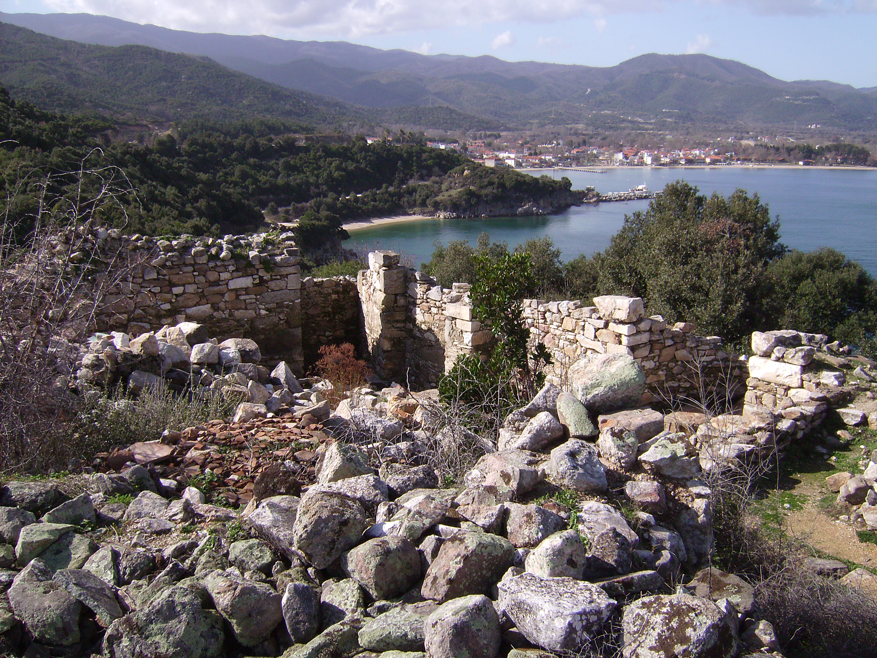 «Τορώνη»